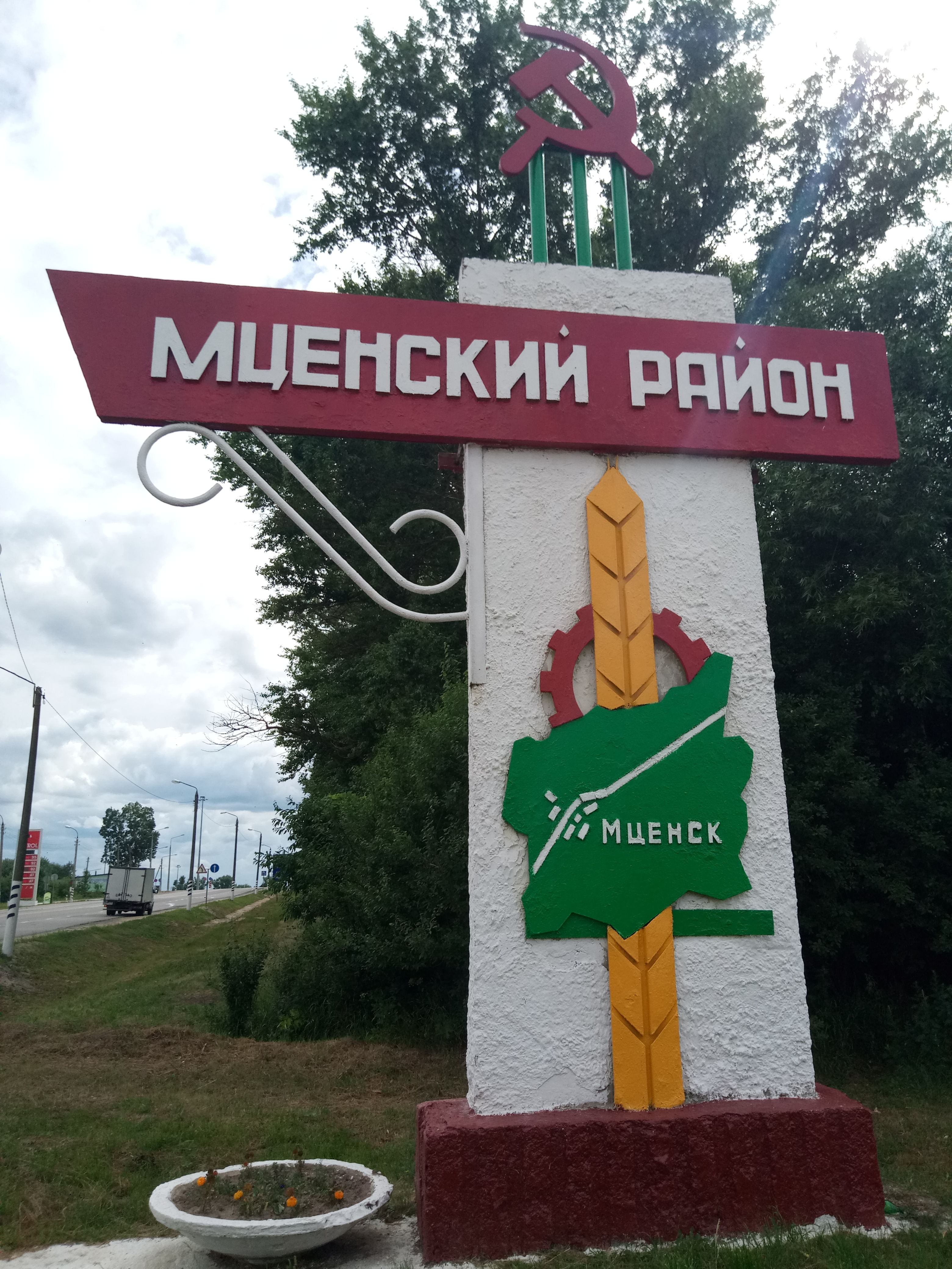 стела Мценский район